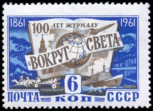 Почтовая марка СССР 1961 года. 100 лет журналу «Вокруг света». На марке изображены эмблема журнала, Спасская башня Кремля, почтовая тройка, атомоход «Ленин», планета Сатурн. Номер по каталогу ЦФА — 4661.